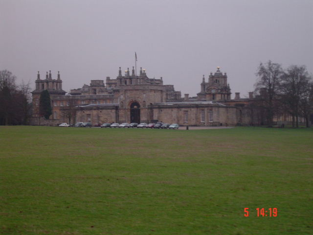 Here's Blenheim palace